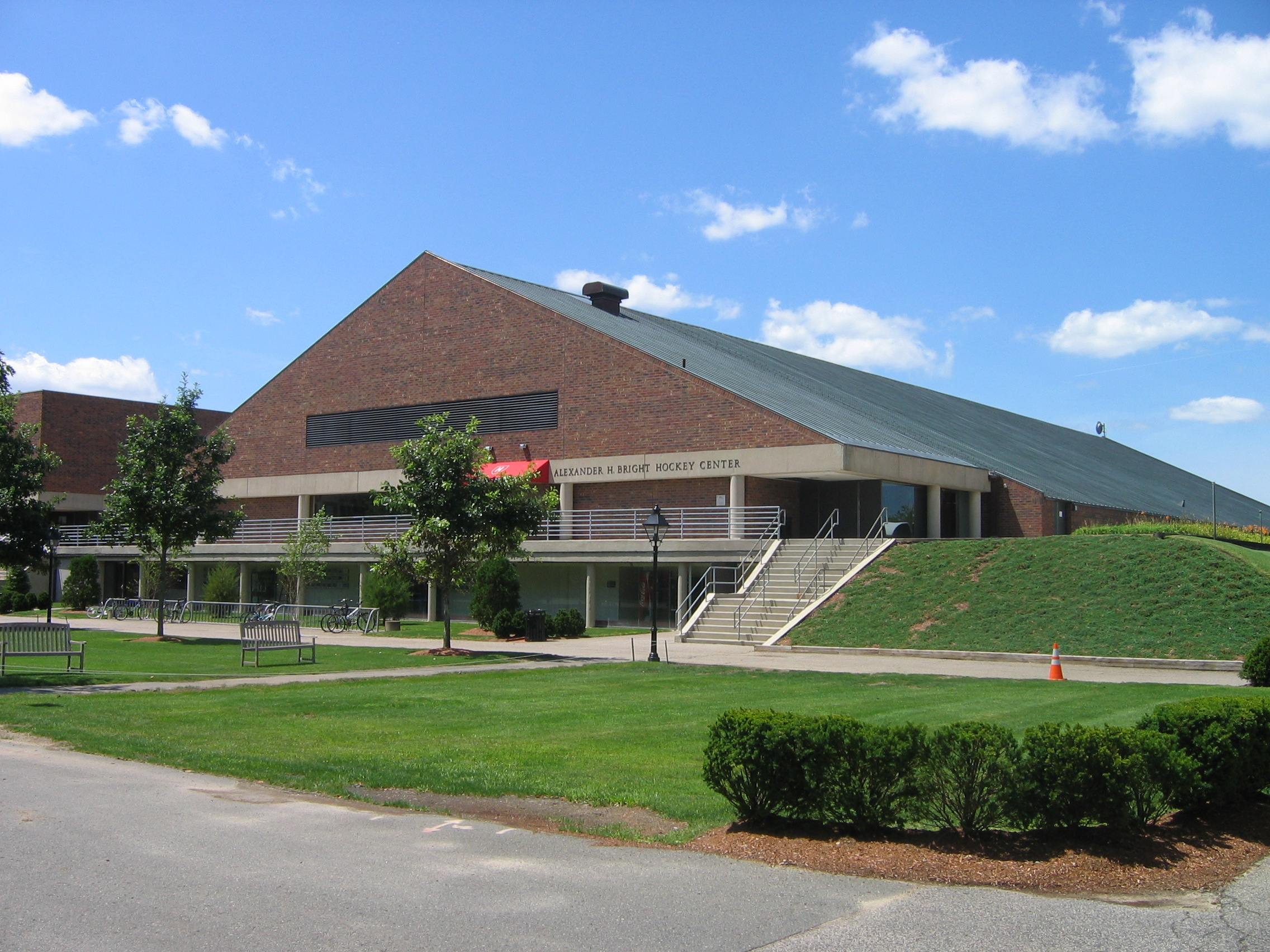 Harvard Hockey Rink